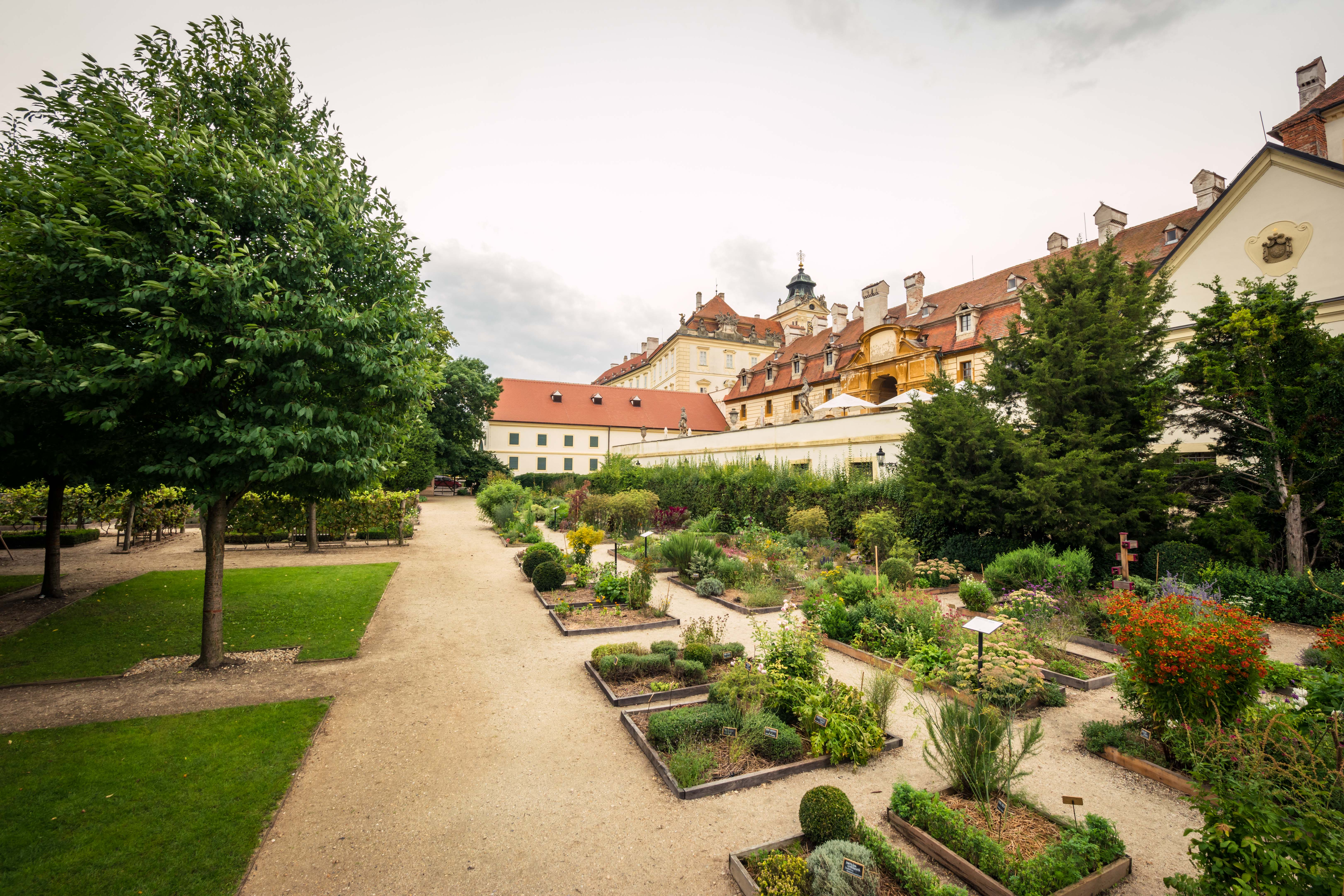 Pohled napříč Bylinkovou zahradou.